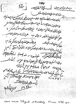 Копия письма З. Расулева М. И. Уметбаеву